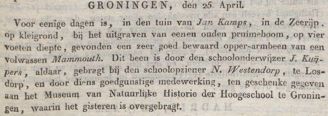 Krantenartikel over opgraving mammoet in Zeerijp.